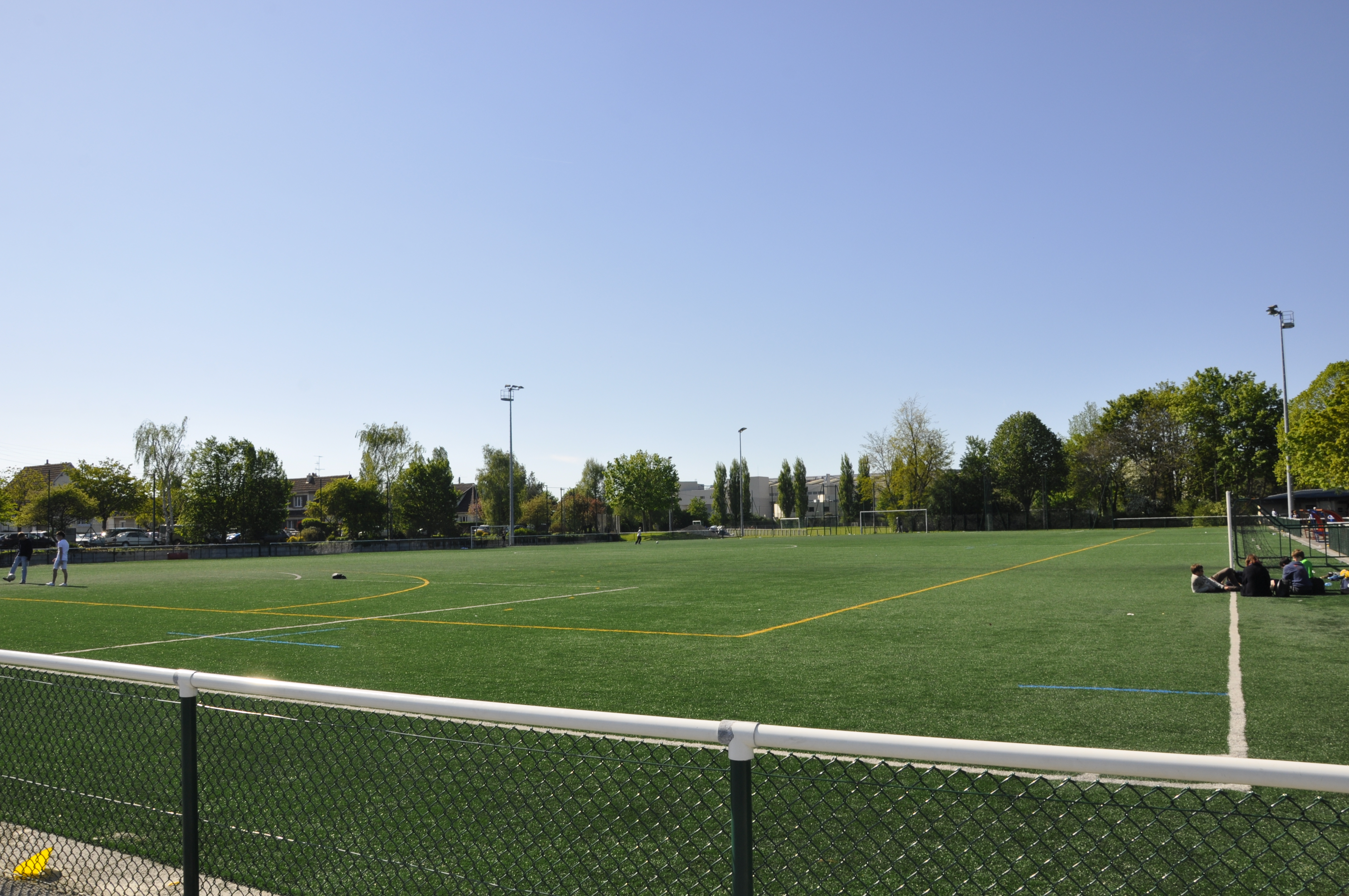 le terrain synthétique du stade de Venoix